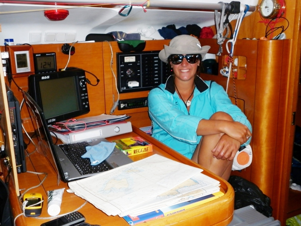 Photo de l'intérieur du bateau d'expéditions et de l'équipement scientifique de la SCS